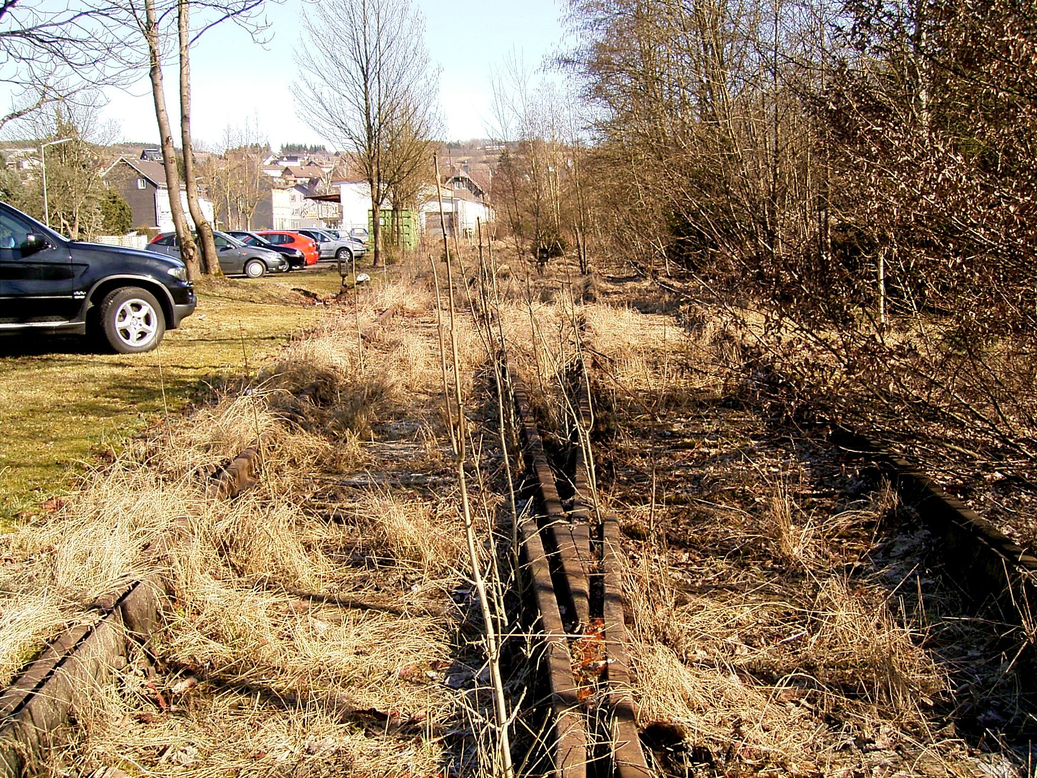 Morsbach